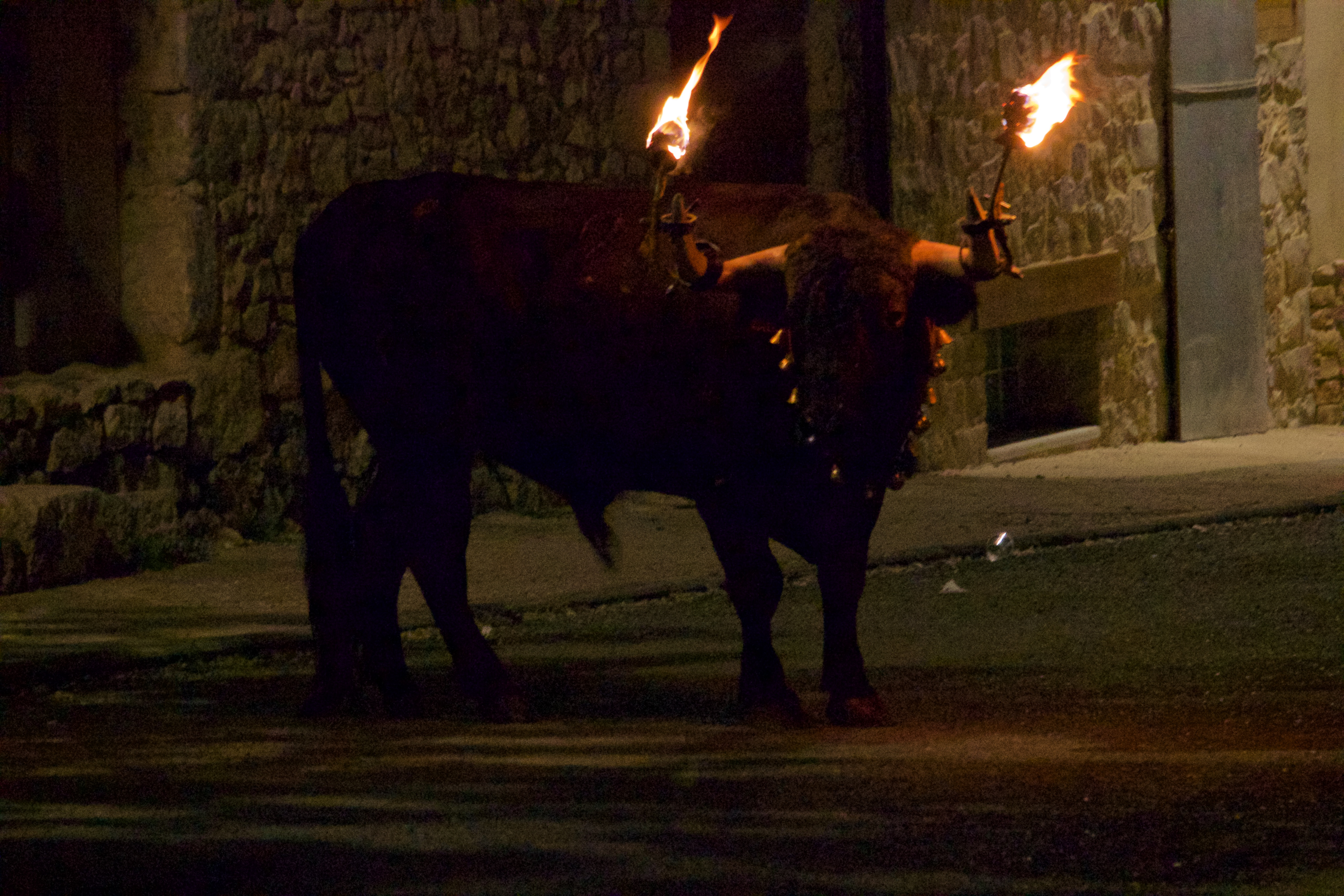 Fortanete #Maestrazgo #Teruel